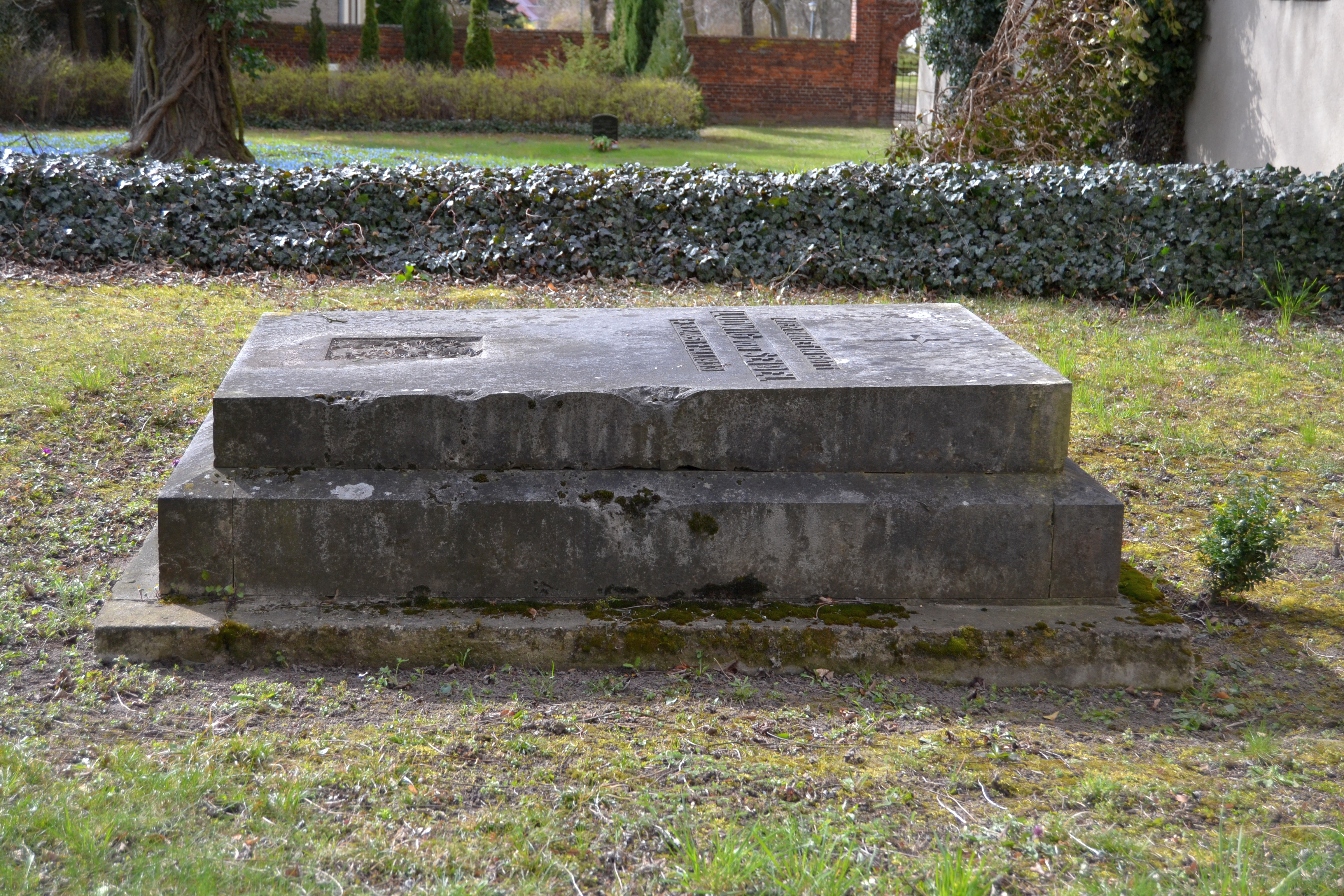 Fotoprojekt – Zwischen Berlin und Oder 2015 Photo project “Between Berlin and River Oder 2015” This template will categorize into Category:Zwischen Berlin und Oder 2015.